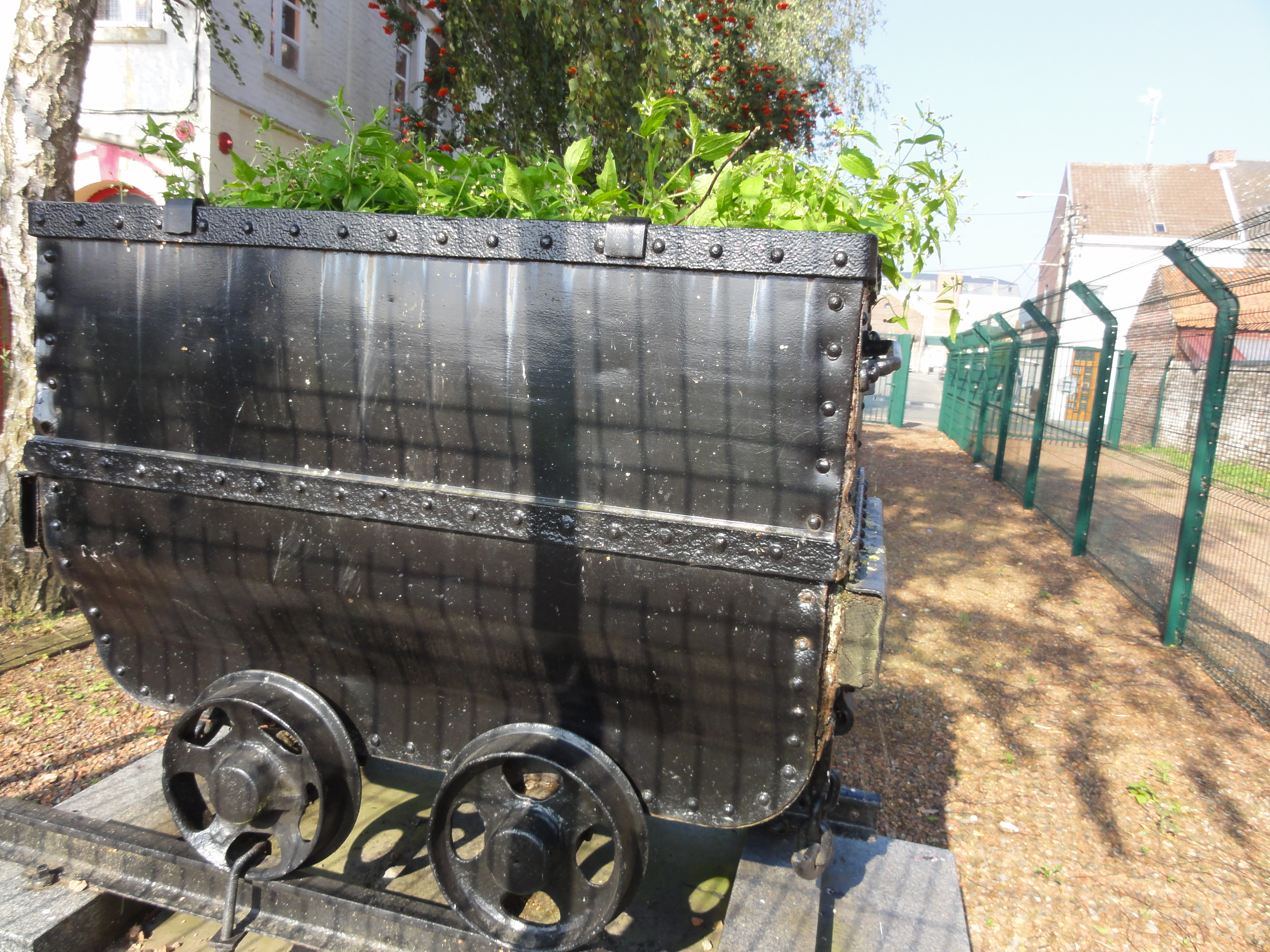 La Fosse n° 1 - 1 bis de la Compagnie des mines de Crespin était un charbonnage constitué de deux puits situé à Quiévrechain, Nord, Nord-Pas-de-Calais, France.